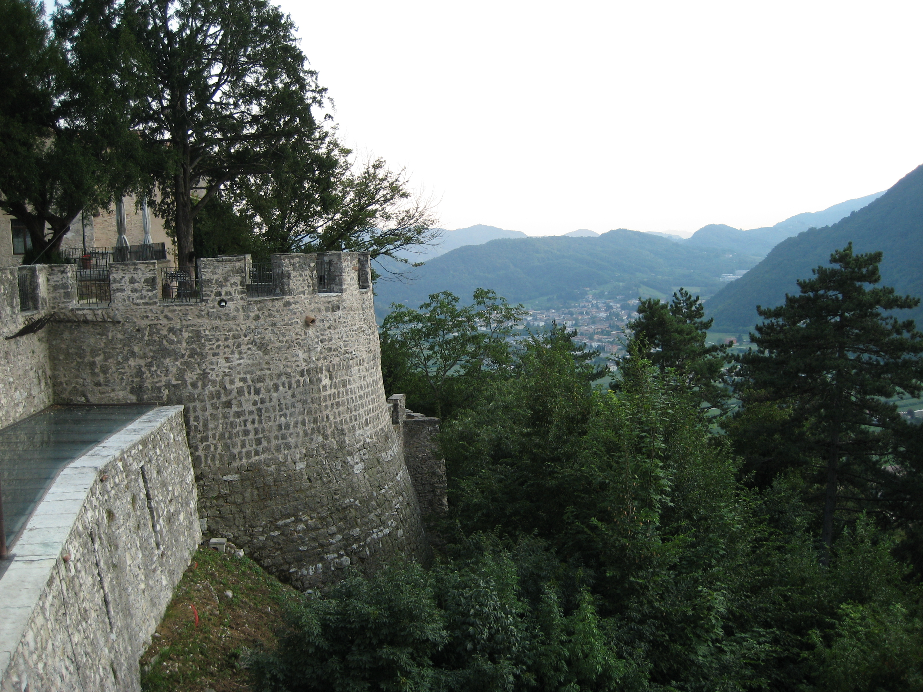 Particolare di un bastione di Castelbrando; sullo sfondo, l'abitato di Follina.